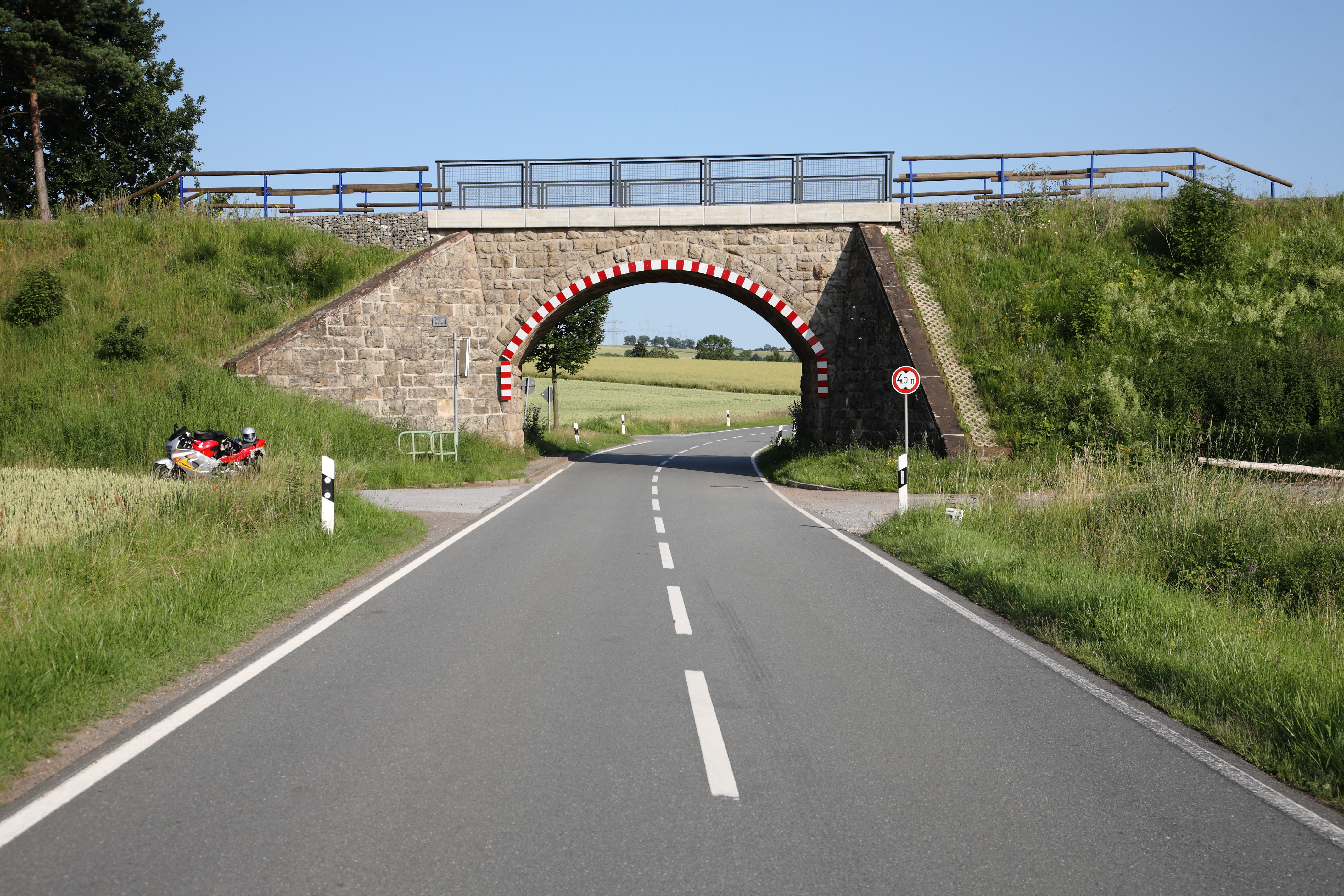 Die Brücke der ehemaligen Bahnstrecke Wabern–Brilon Wald (Ederseebahn) in Waldeck-Höringhausen über die Kreisstraße K15 zwischen Korbach-Strothe und Waldeck-Höringhausen (Blick in Richtung Höringhausen).